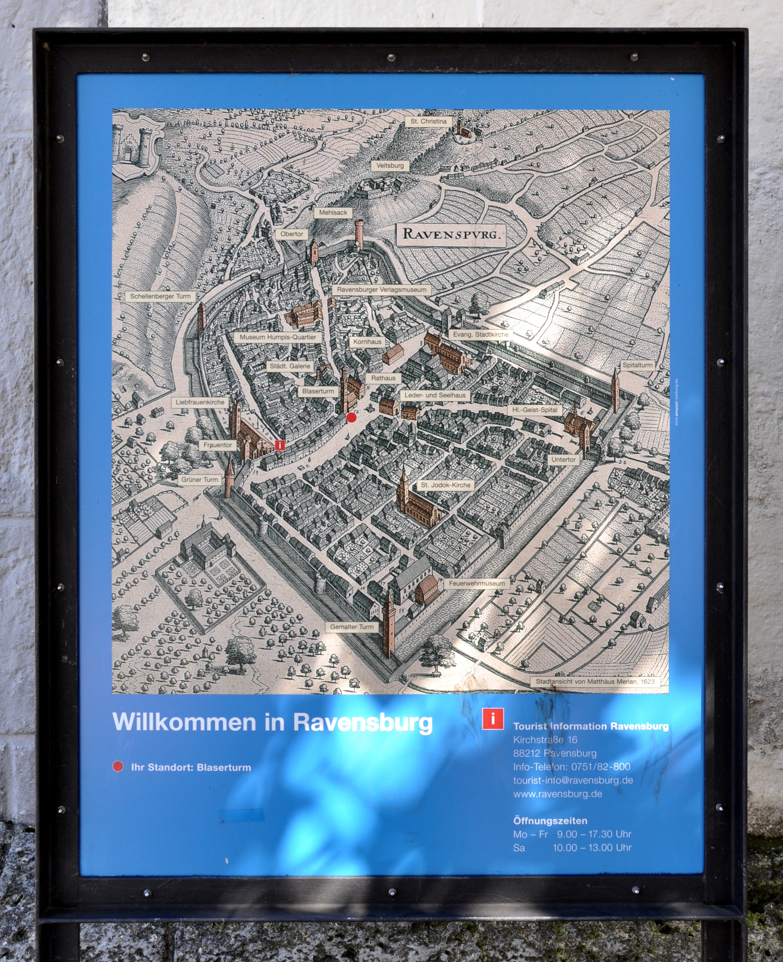 Ravensburg, Marienplatz, touristische Informationstafel vor dem Blaserturm zu Sehenswürdigkeiten anhand des Stichs von Merian aus dem 17. Jh. (der im Bereich der Altstadt immer noch weitgehend zutrifft)